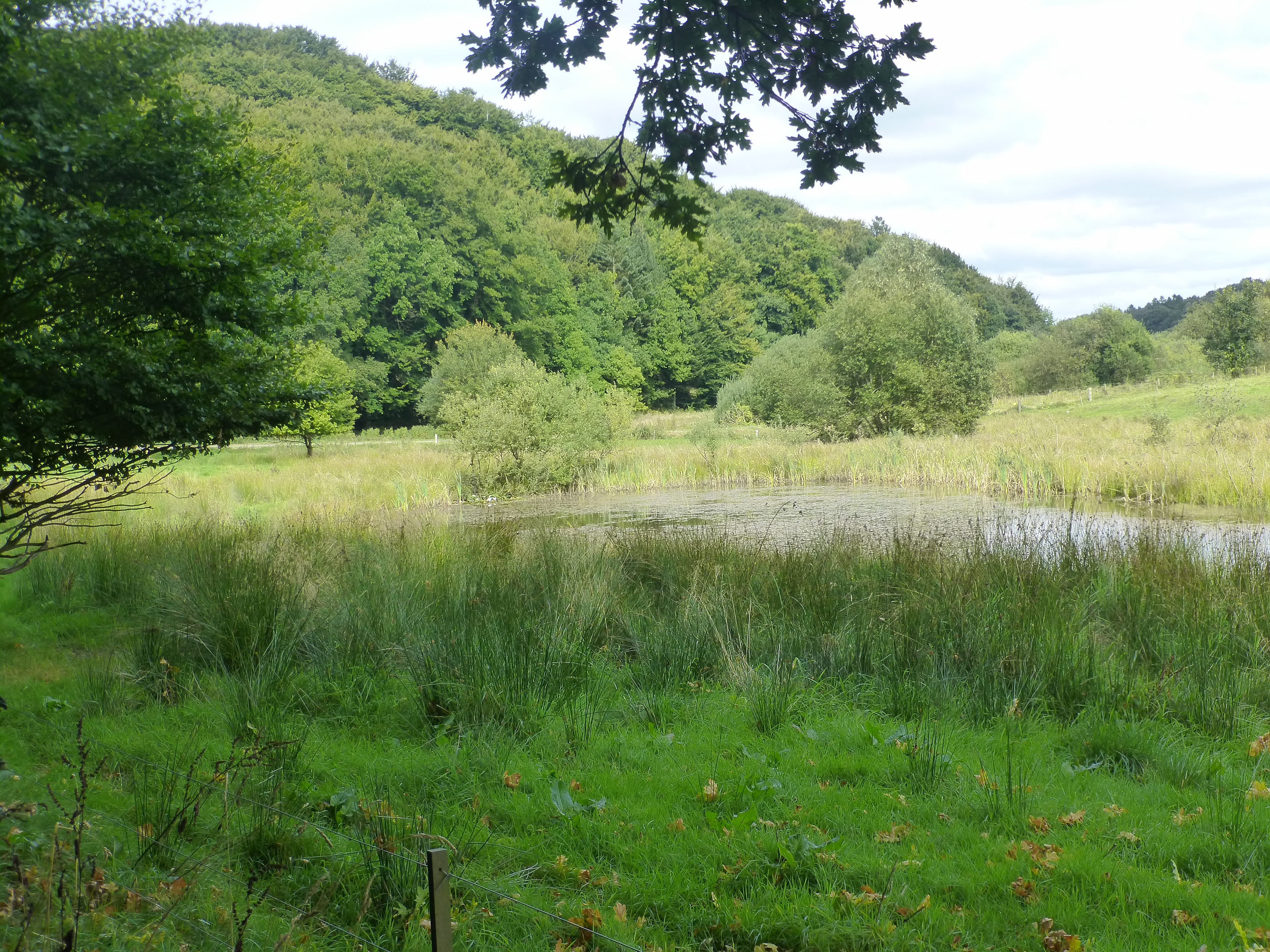 Jeksendalen set mod nord